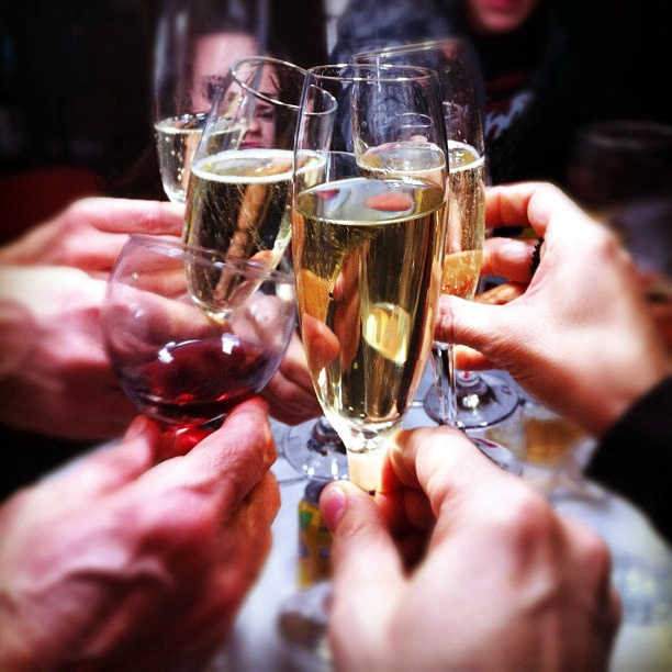 Brindis en época navideña.